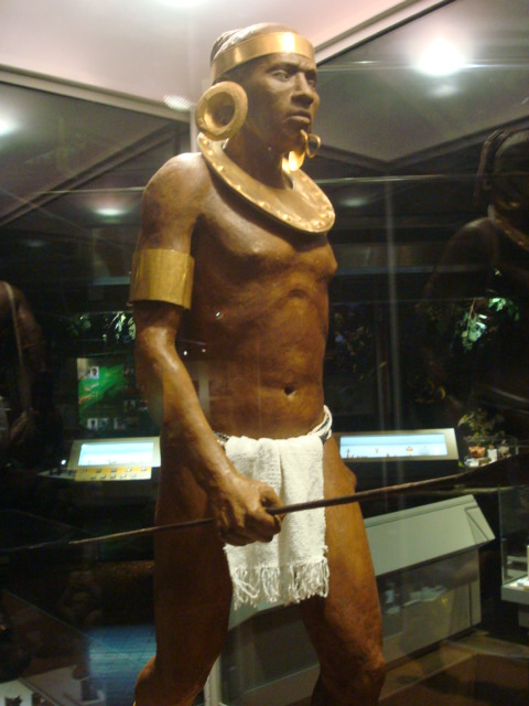 Objetos de oro precolombino, recuperados del Pacífico sur de Costa Rica, colocados sobre una ifigie que representa un guerrero precolombino. Museo del Oro Precolombino. San José de Costa Rica.